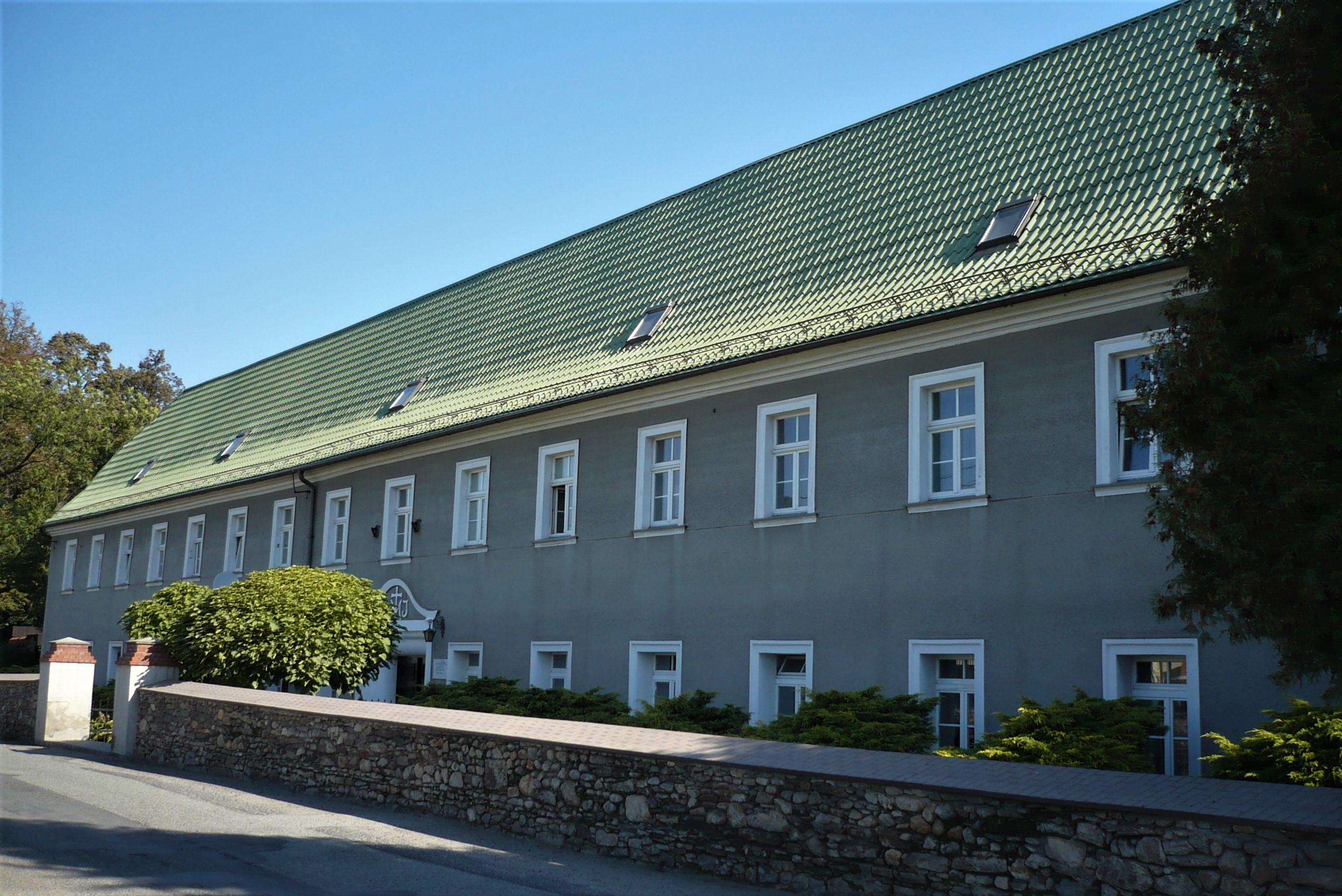 Bodzanów. Klasztor oblatów